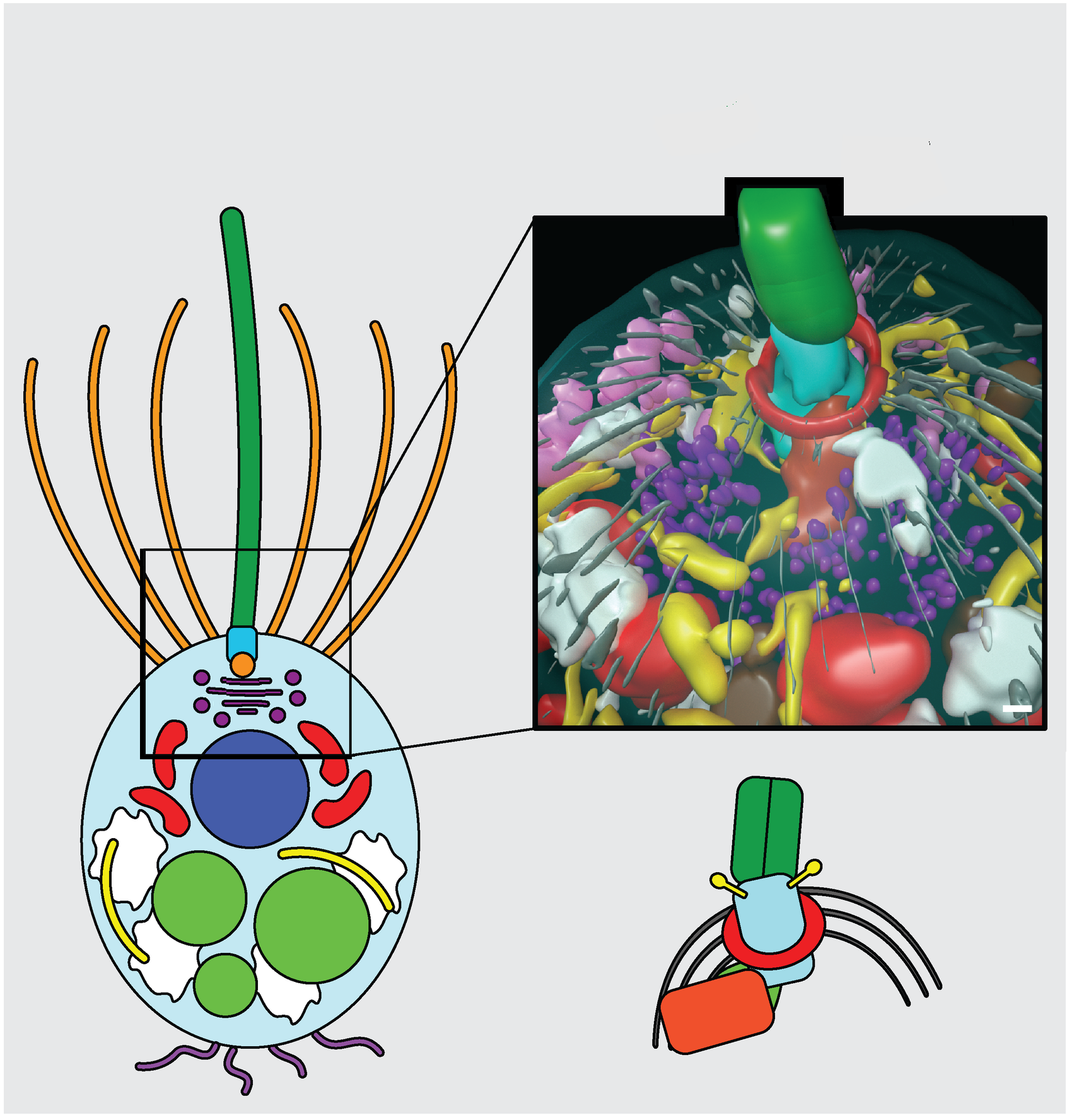 Fig. 4. G) Arquitectura celular 3D de coanoflagelado. Reconstrucción del polo apical de coanoflagelado se muestran las vesículas apicales (rosa), la vacuola alimentaria (verde claro), ER (amarillo), el cuerpo basal flagelar (azul claro), el flagelo (verde oscuro), el aparato de Golgi y las vesículas asociadas a Golgi (púrpura). glucógeno (blanco), vesículas grandes (marrón), Microtúbulos (gris), anillo microtubular (rojo) y cuerpo basal no flagelar (naranja oscuro). Barras de escala = 200 nm. Los diagramas de la estructura del kinetido fino de coanoflagelado destacan las diferencias distintivas. ER, retículo endoplásmico; ssTEM, microscopía electrónica de transmisión ultrafina en serie.